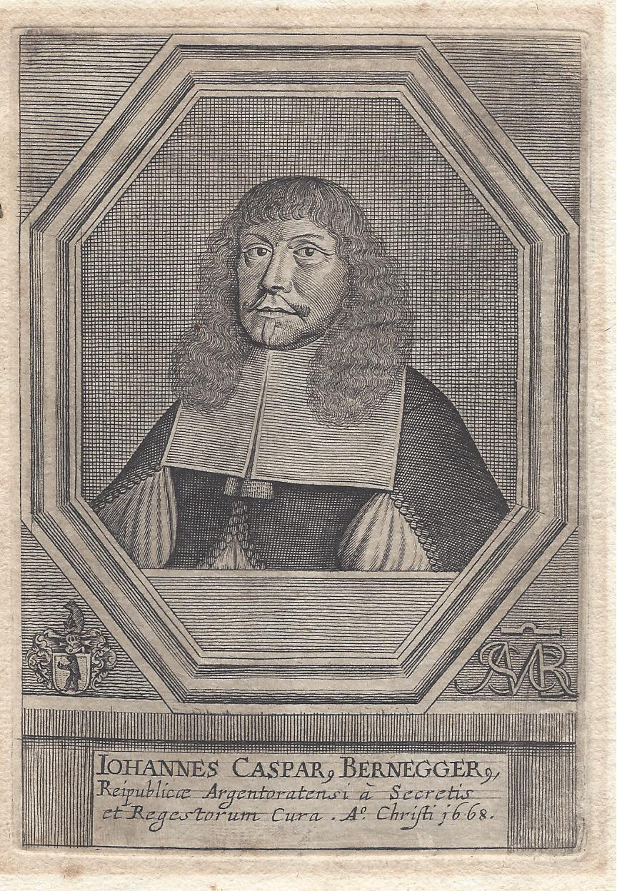 Johannes Caspar Bernegger, Reipublicae Argentoratensi à Secretis et Regestorum Cura. A° Christi 1668. Anonymer Kupferstich.